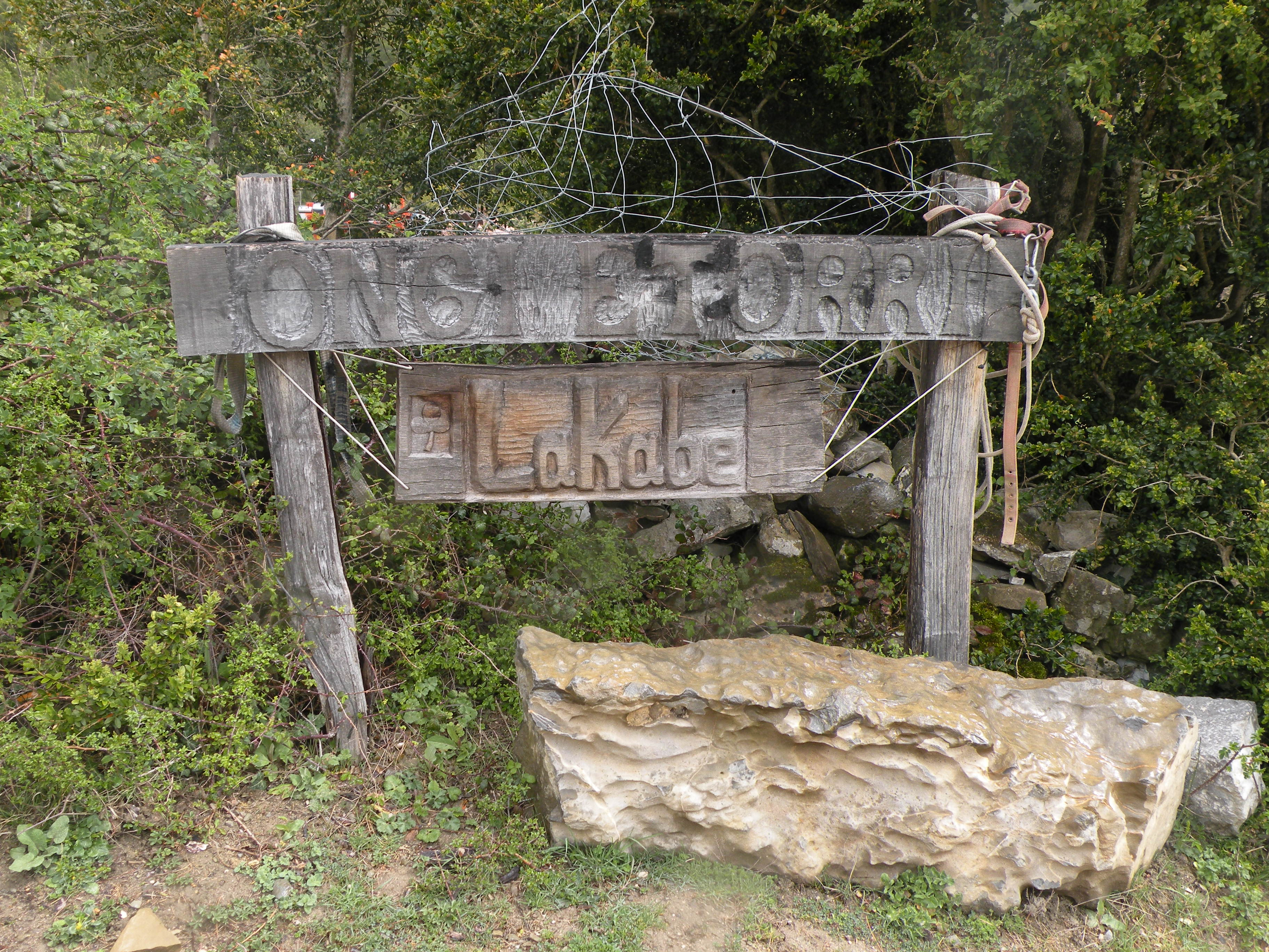 Foto de l'entrada del poble de Lacabe (euskera: Lakabe), una petita comunitat ubicada al nord de Navarra, pertany al municipi de Arce/Artzi a Navarra.